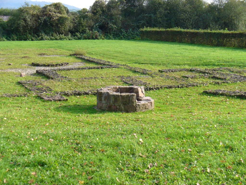 Friesenheim, Roman Foundations